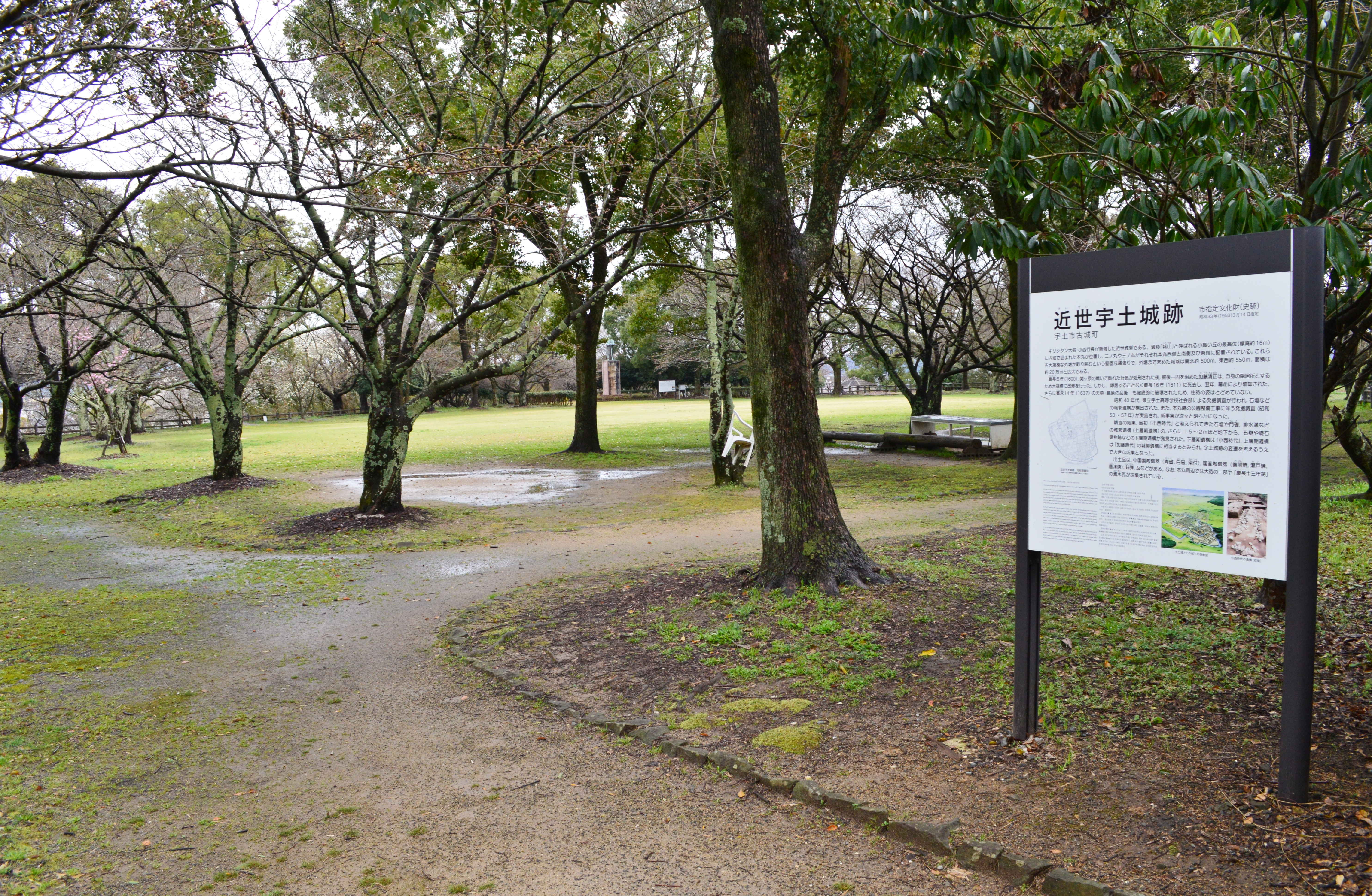 近世宇土城 本丸